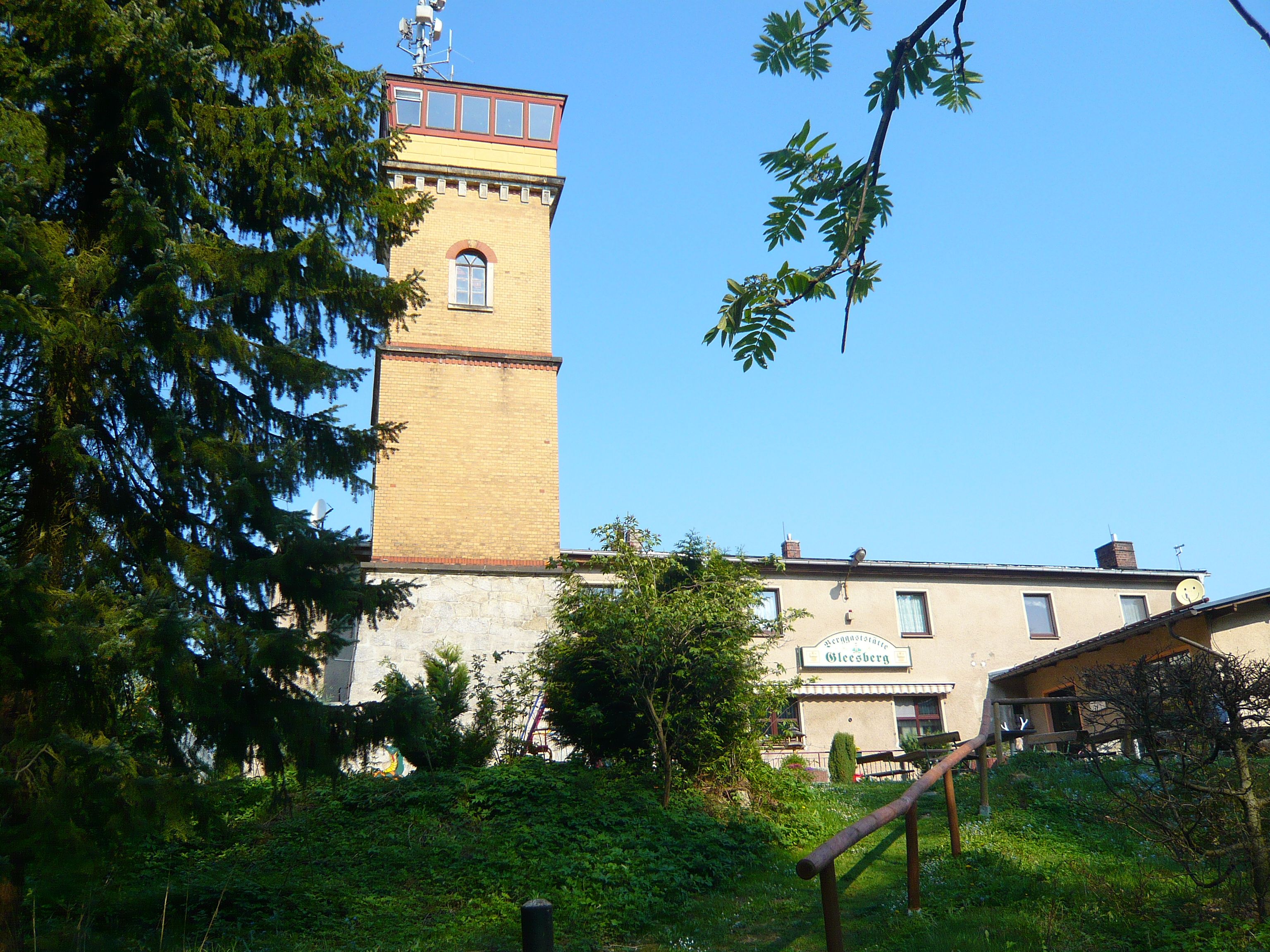 Gleesberg bei Schneeberg: Berggasthof mit Köhlerturm